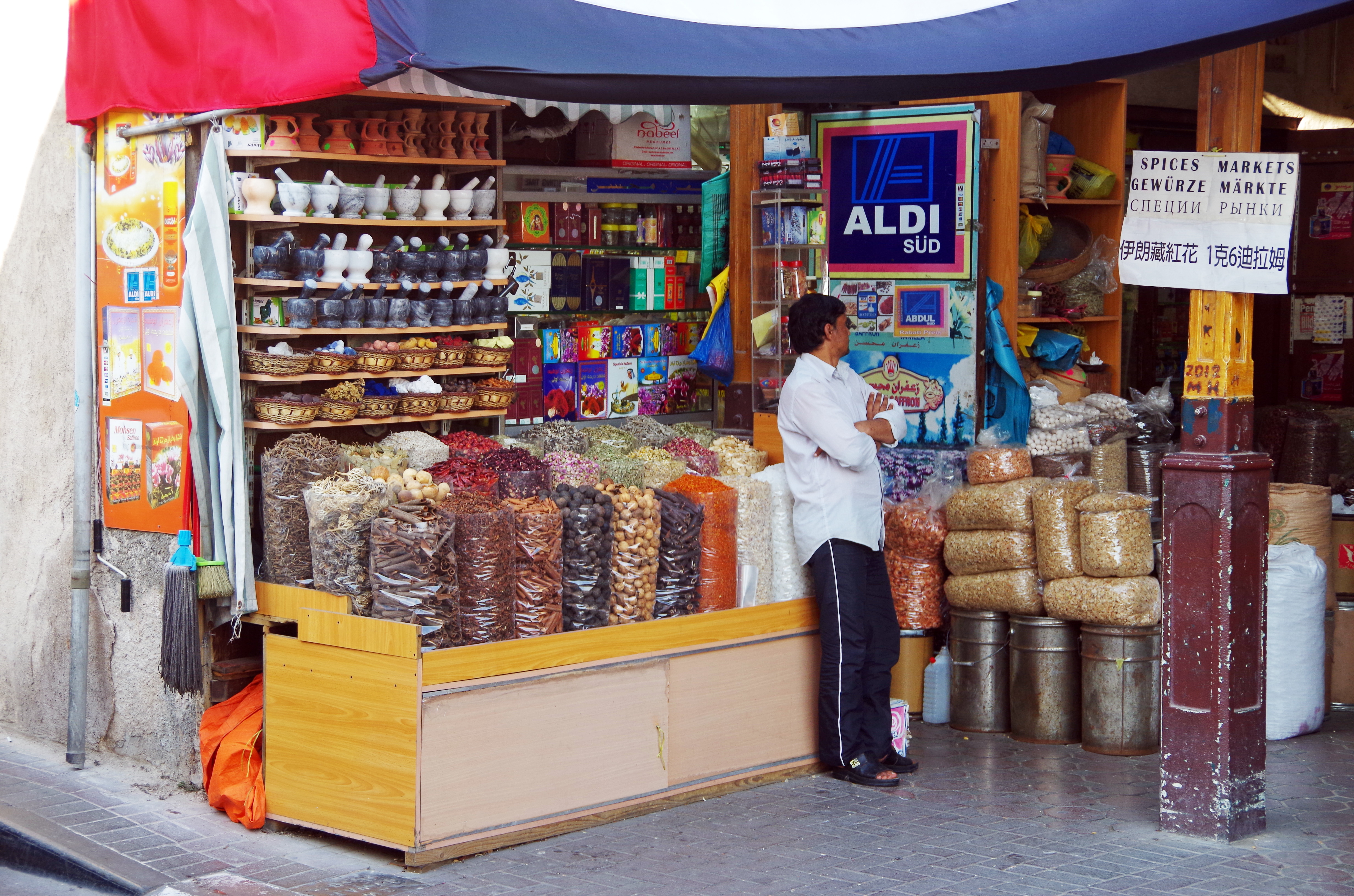 Dubai, Deira, Old Souk, Shop mit Plakat ALDI SÜD